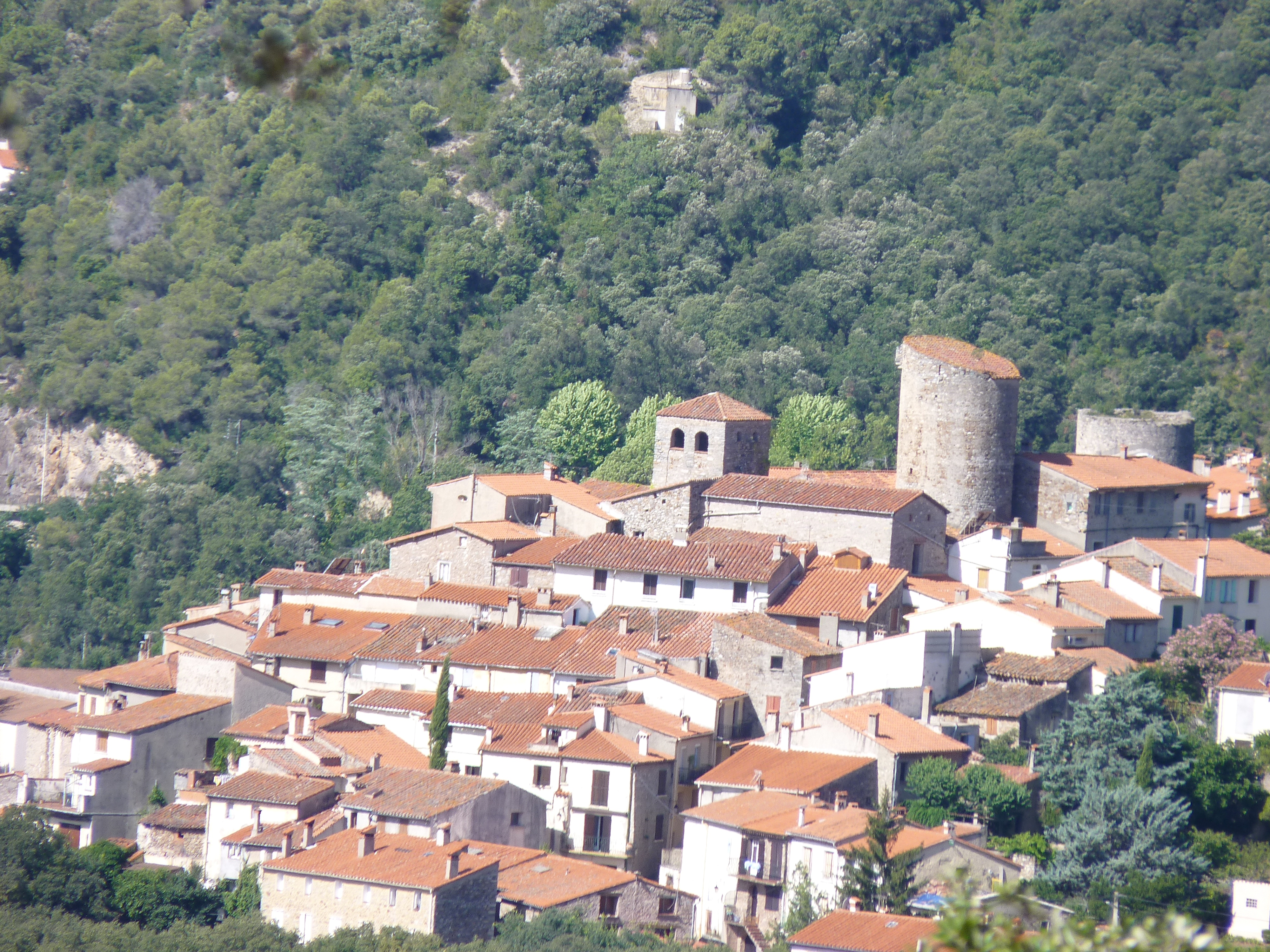 Village de Palalda, Amélie-les-Bains-Palalda (Pyrénées-Orientales, Languedoc-Roussillon, France)